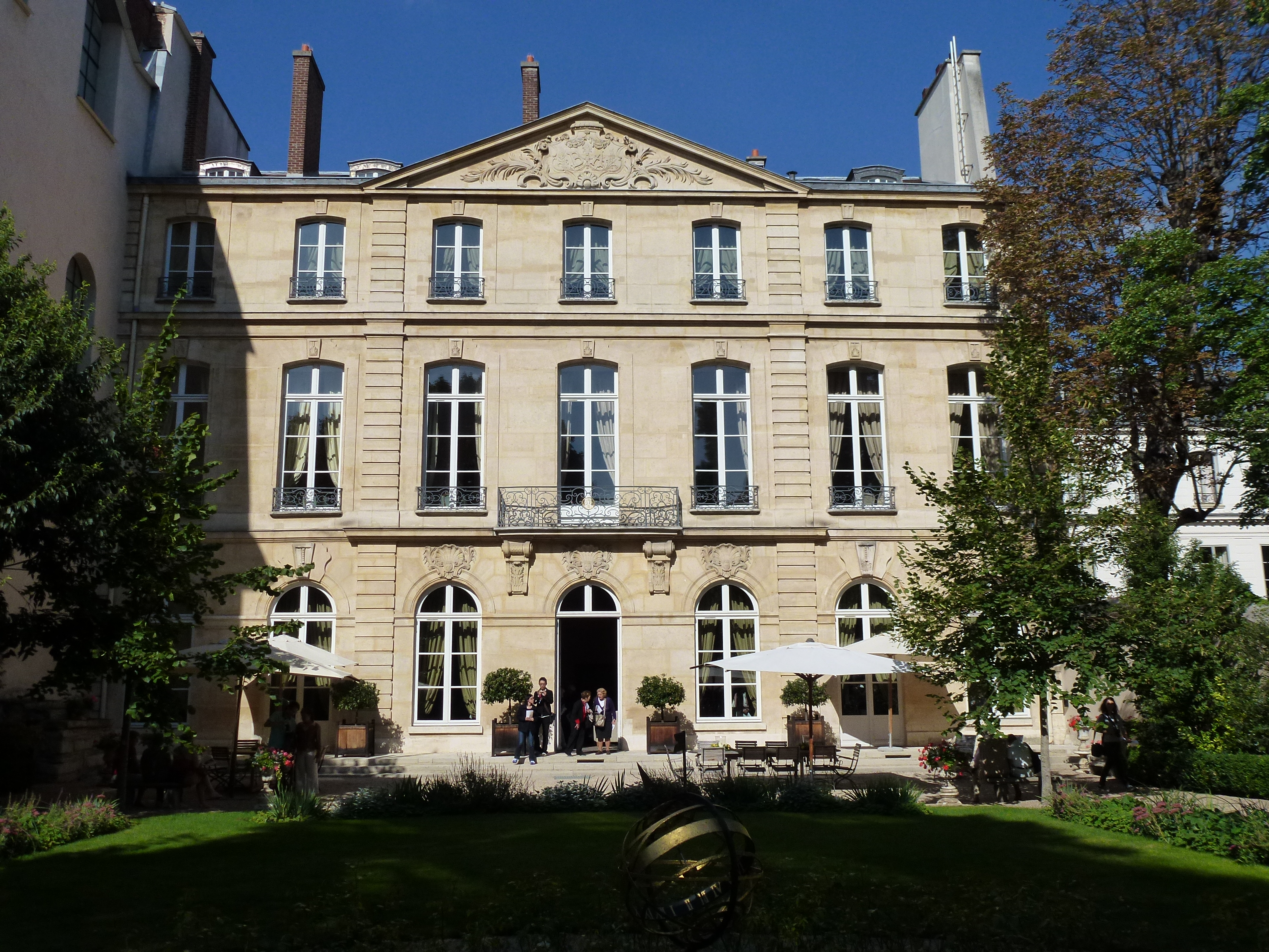 Hôtel d'Avaray au 85 rue de Grenelle à Paris - Résidence de l'Ambassadeur des Pays-Bas en France